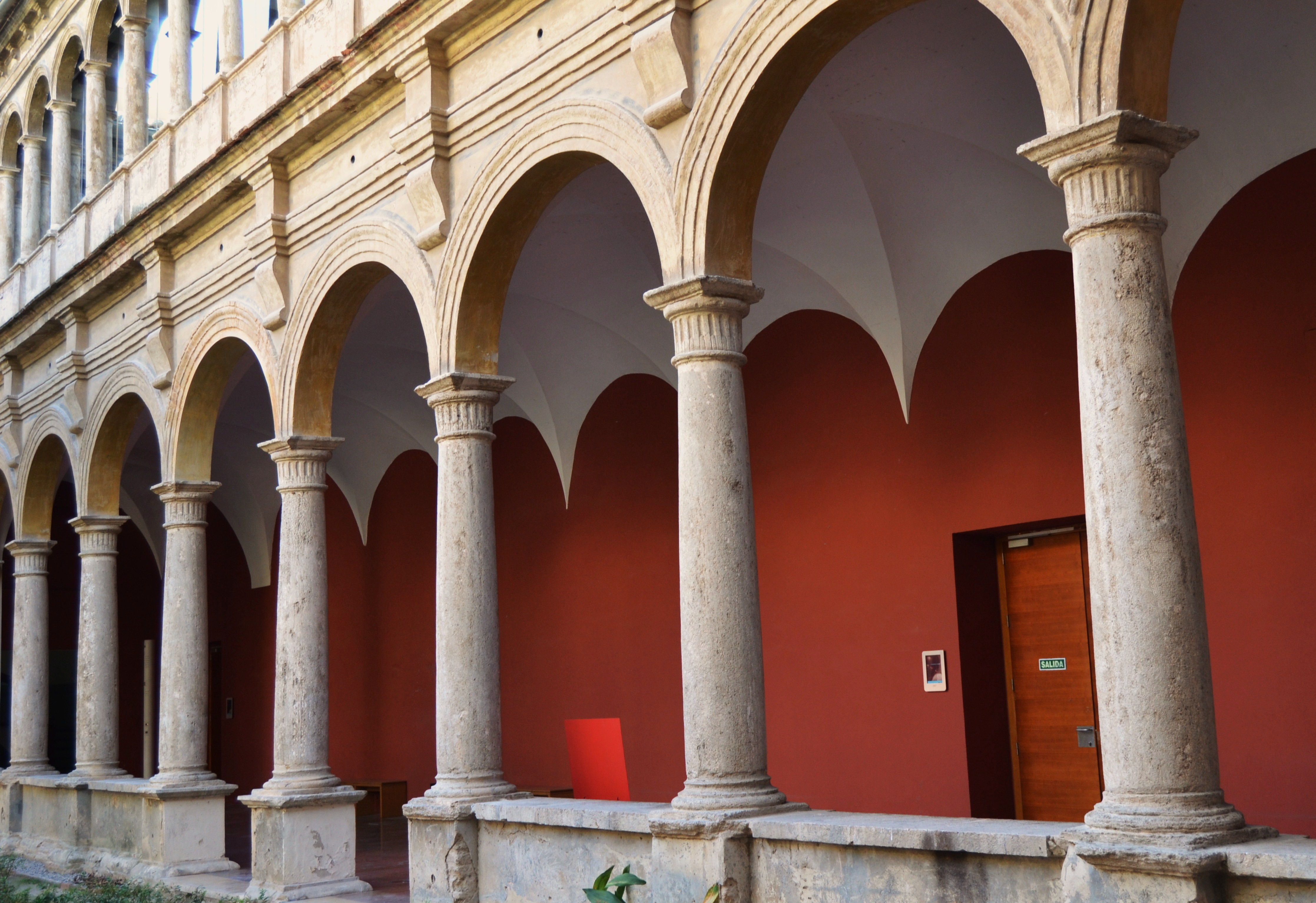 Claustre renaixentista del convent del Carme, arcades.